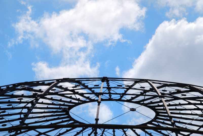 Gasometer, Fichtebunker Kreuzberg, Berlin, Schwedlerkuppel